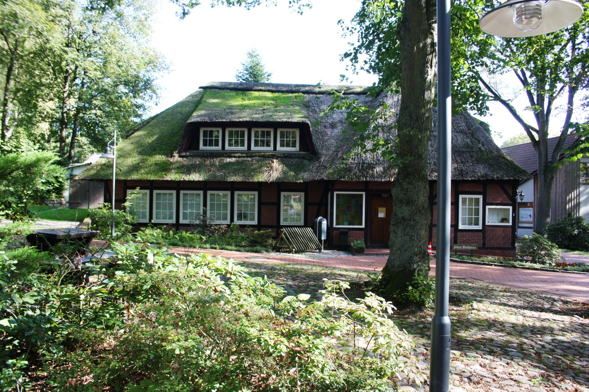 Das alte Rathaus in Jesteburg